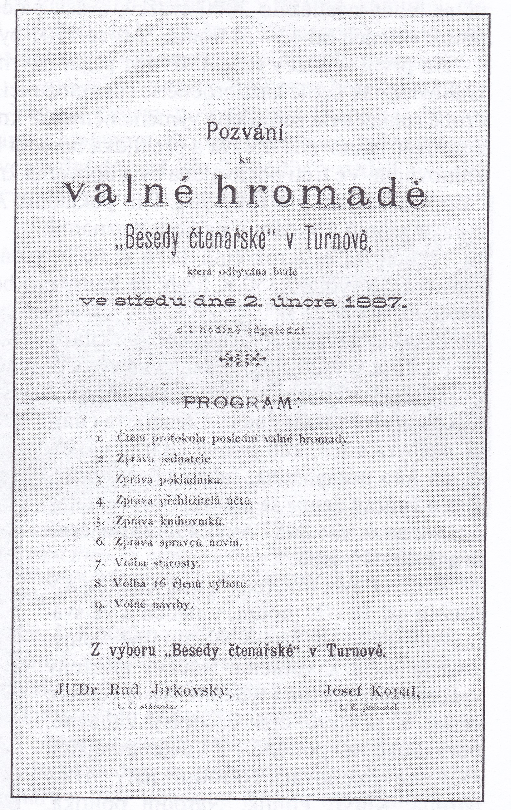 Pozvánka